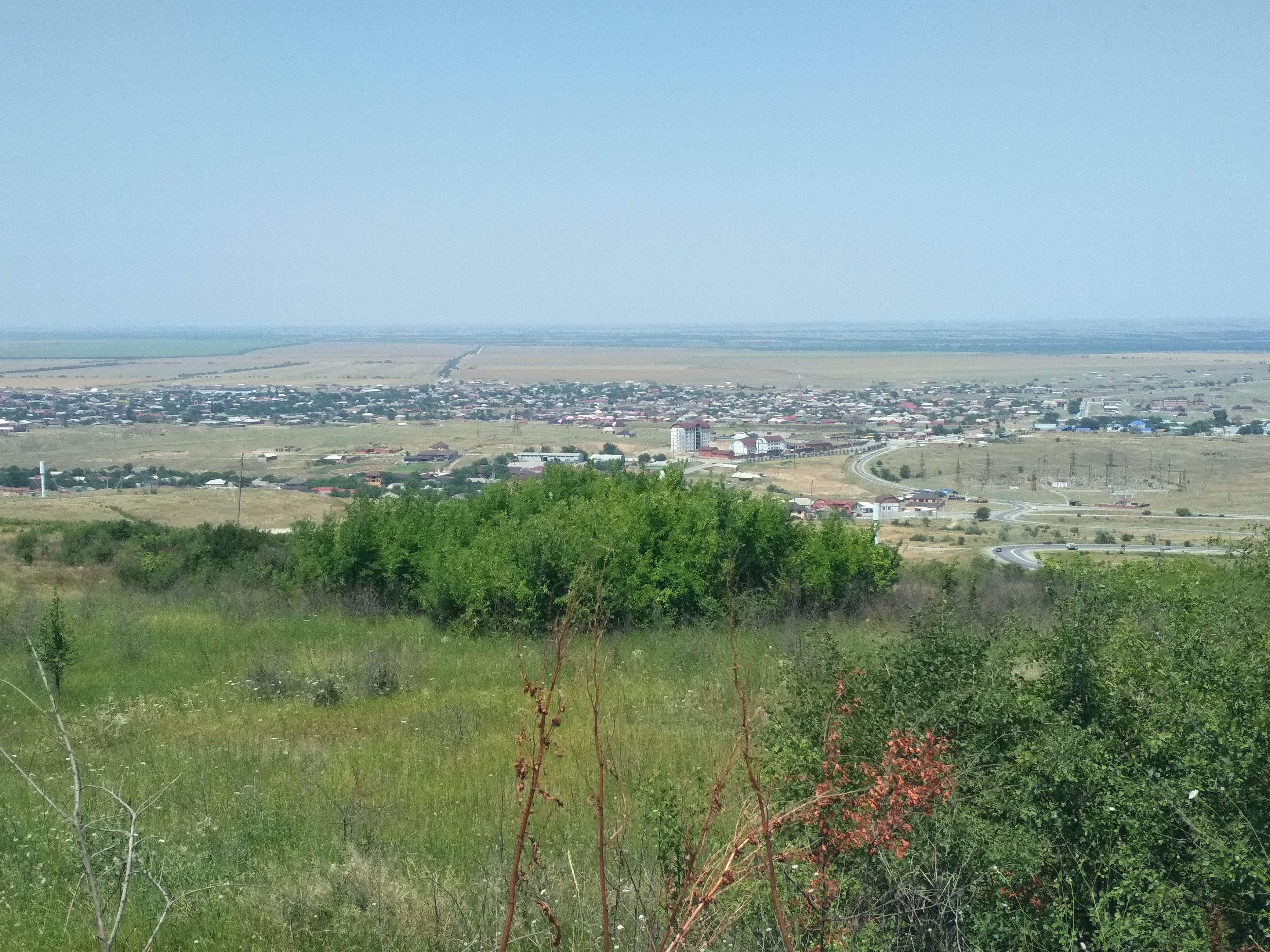 Нохчийн: Девкар-Эвла